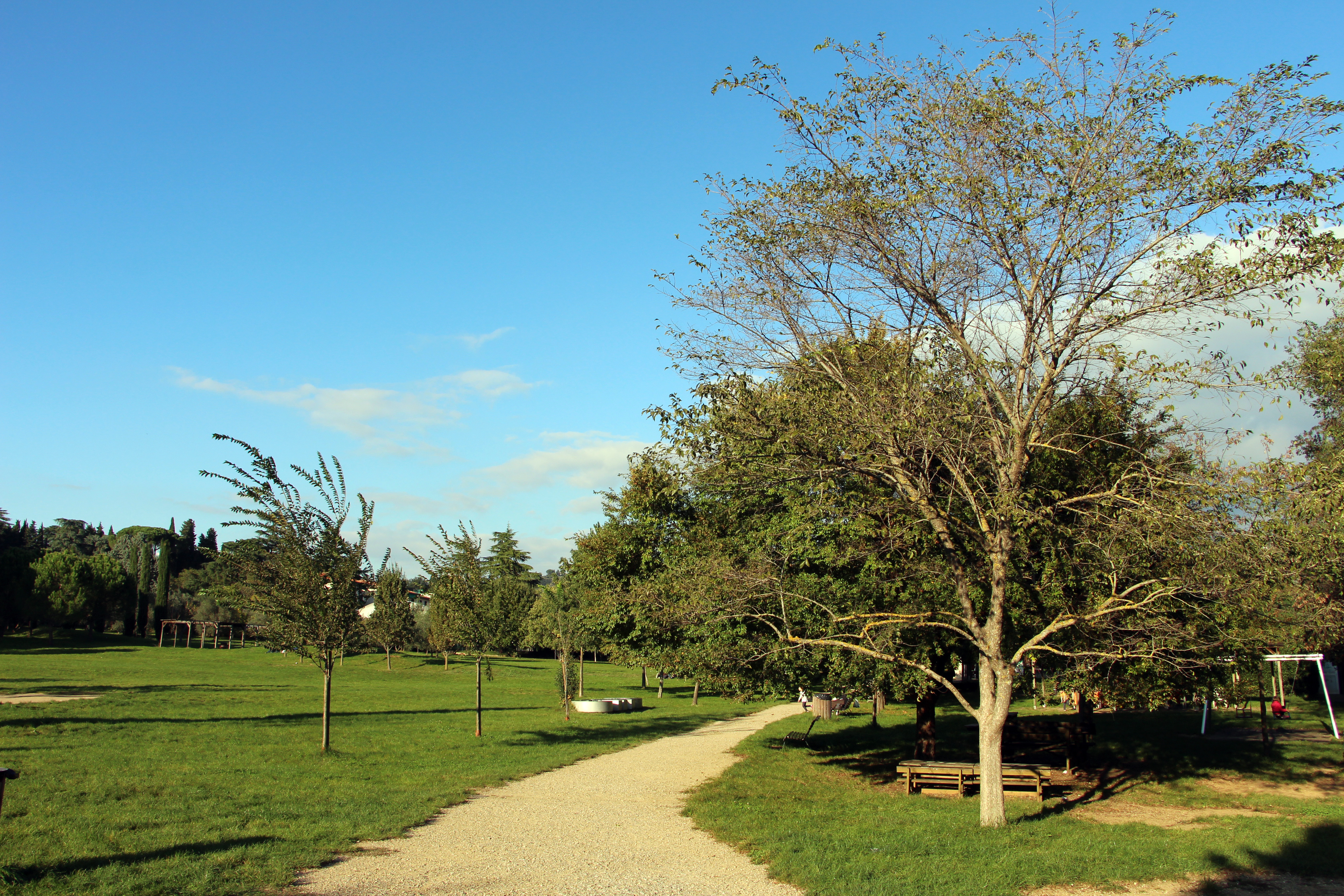 Firenze, vari